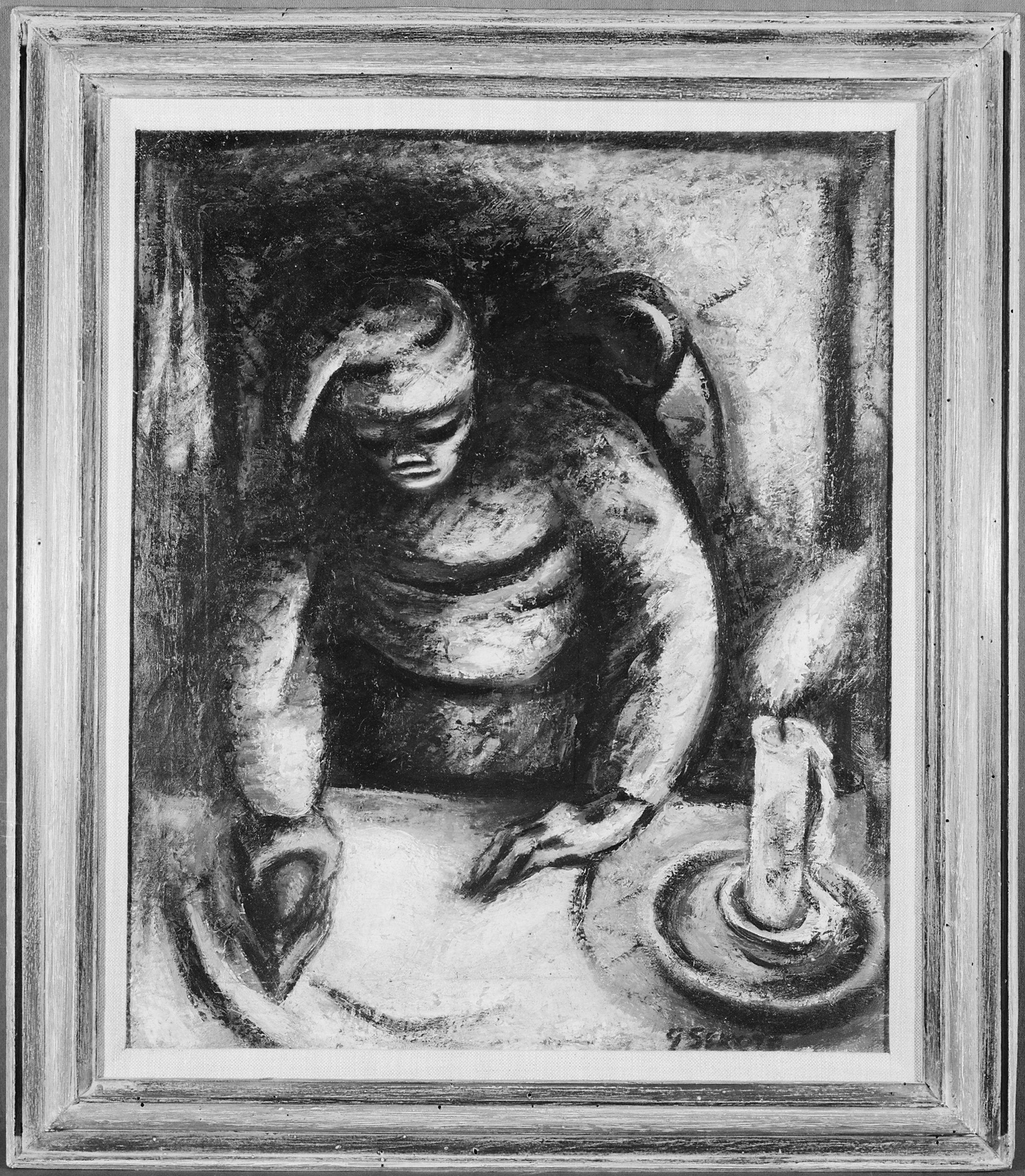 General notes: Oil